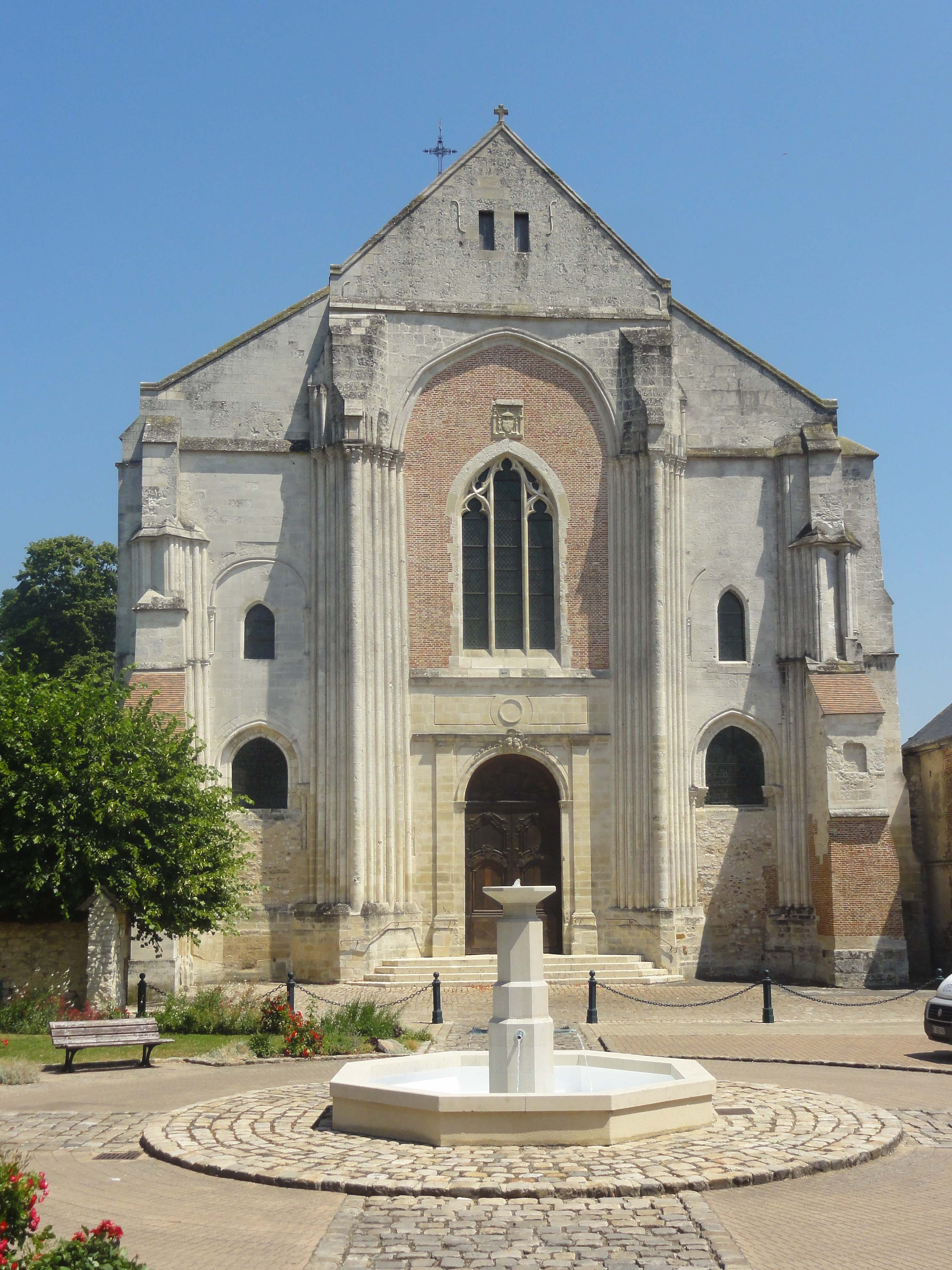 Église abbatiale Saint-Germer de l'ancienne abbaye Saint-Germer-de-Fly - voir le titre du fichier.